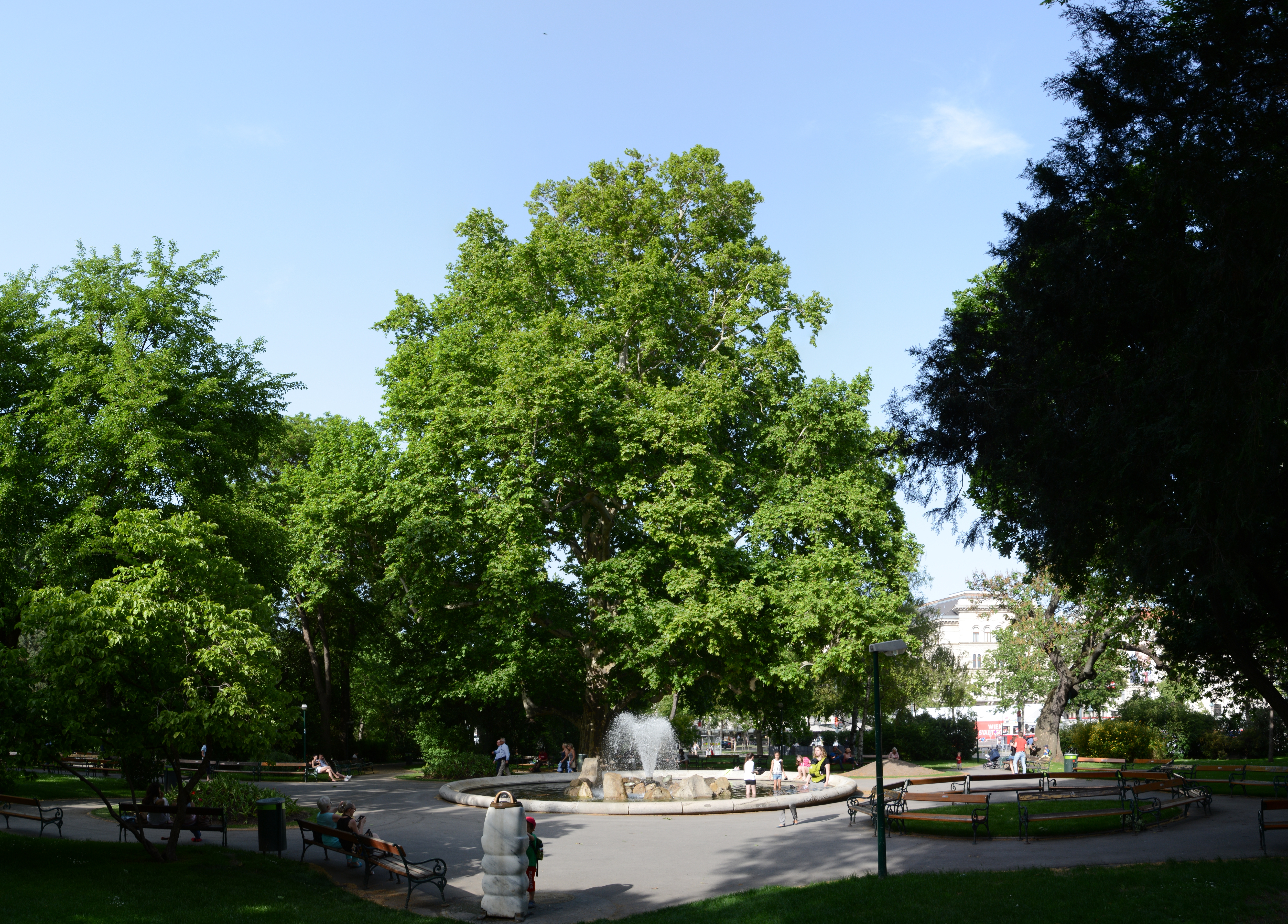 Das Naturdenkmal, eine Platane (Platanus × hispanica), befindet sich im Rathauspark in Wien-Innere Stadt. This media shows the natural monument in Vienna with the ID 566.